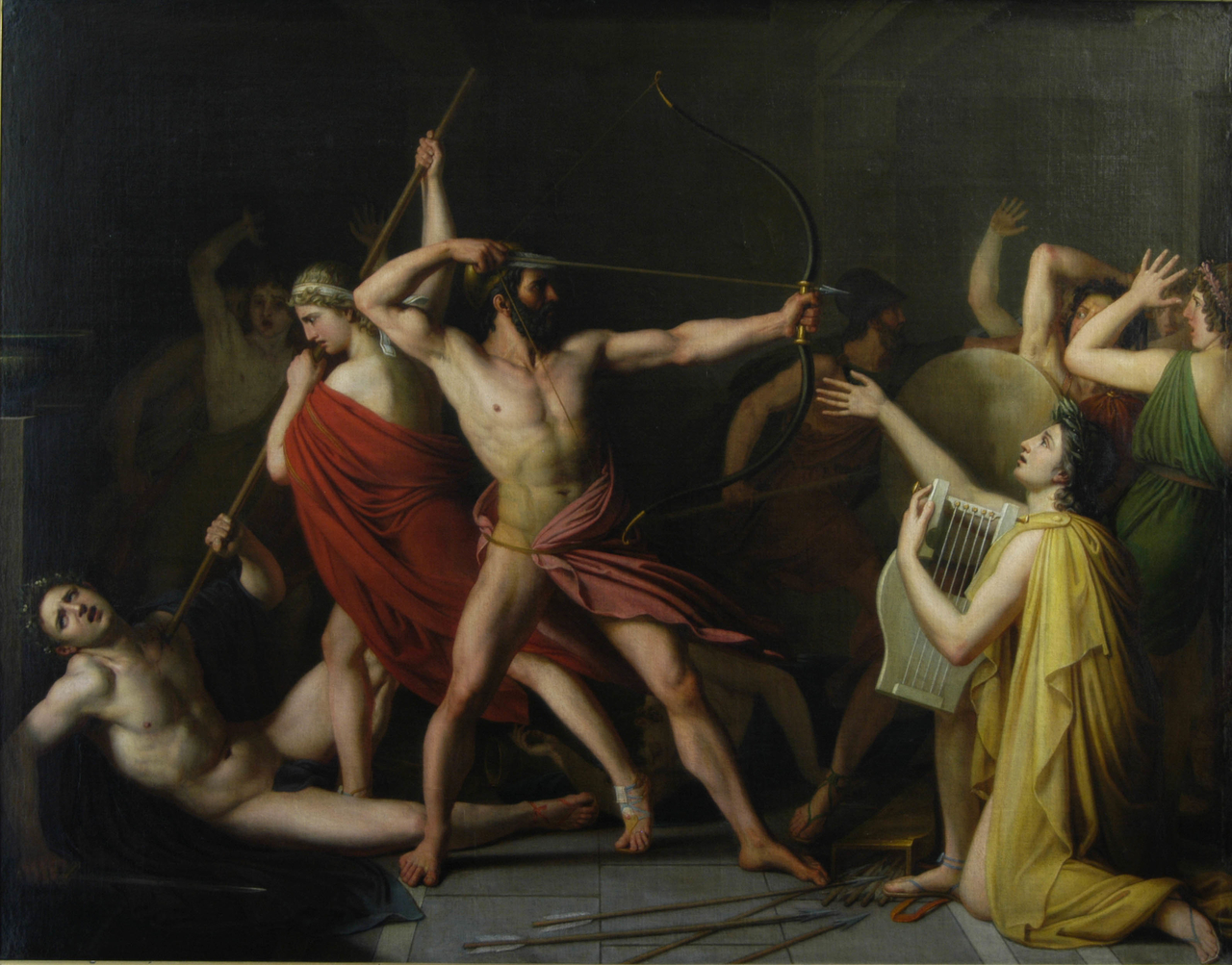 Thomas Degeorge, Ulysse et Télémaque massacrent les prétendants de Pénélope, 1812, Clermont-Ferrand, musée d'Art Roger Quilliot